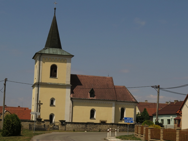 Kostel svatého Jana Křtitele, Vračovice.